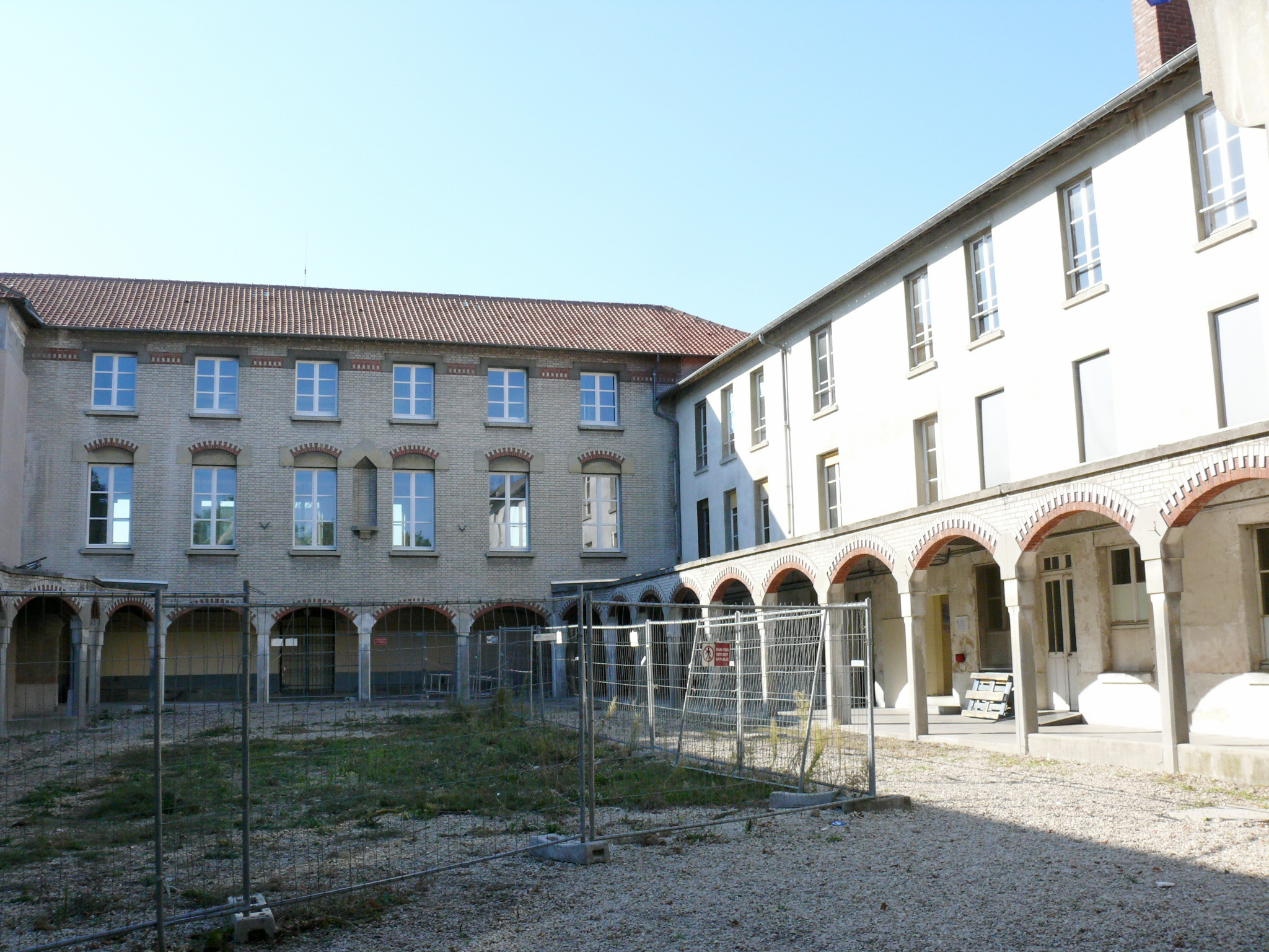 Montmagny (Val-d'Oise - Île-de-France - France) : L'ancien séminaire